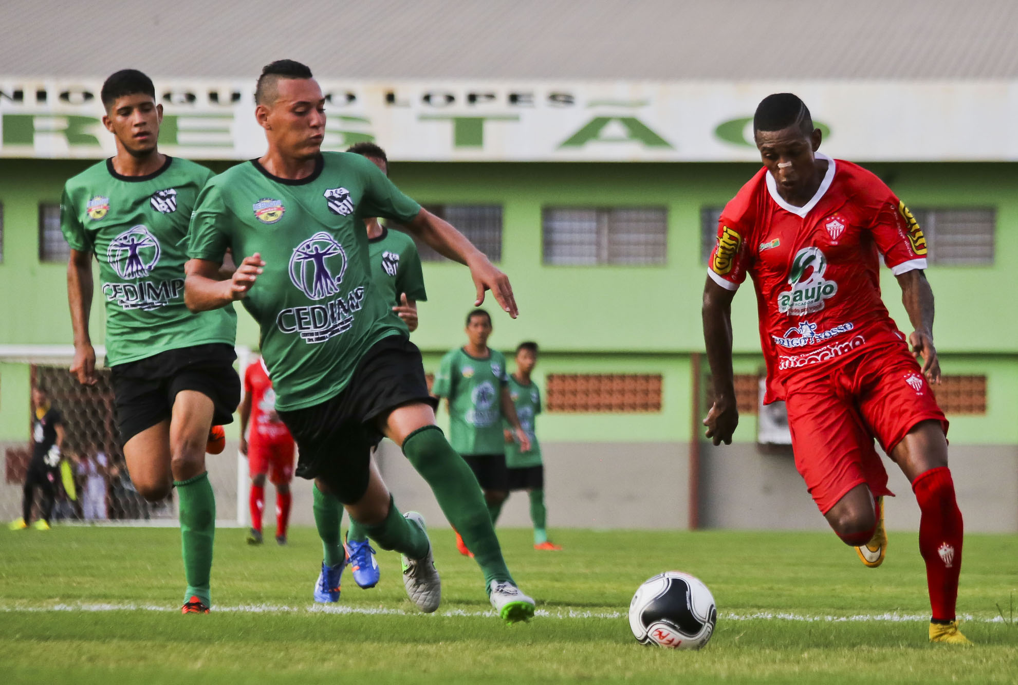 Fotos: Gleilson Miranda/Secom